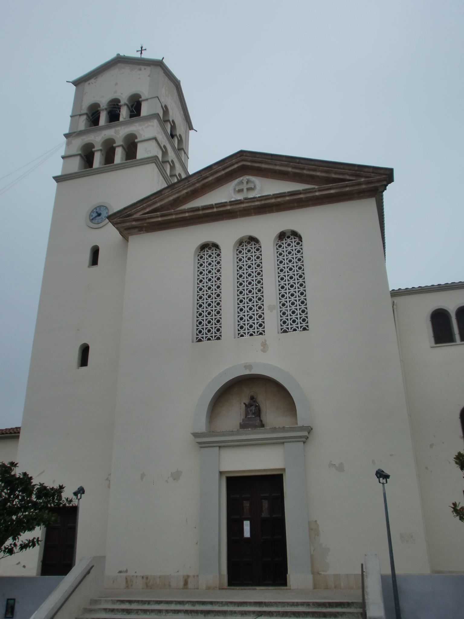 Església Nostra Senyora del Remei (Móra la Nova)